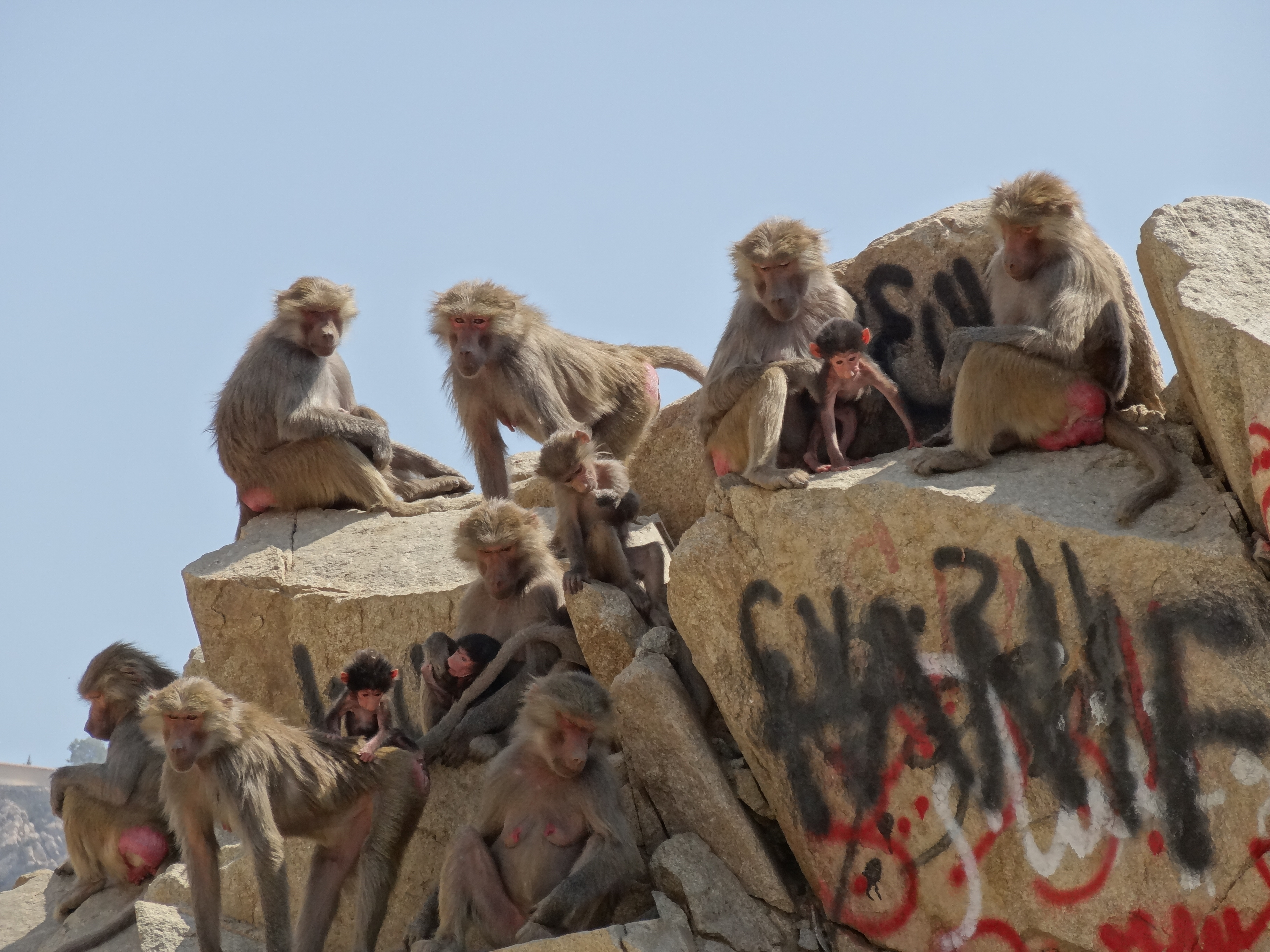 Hamadryas Baboon Harem